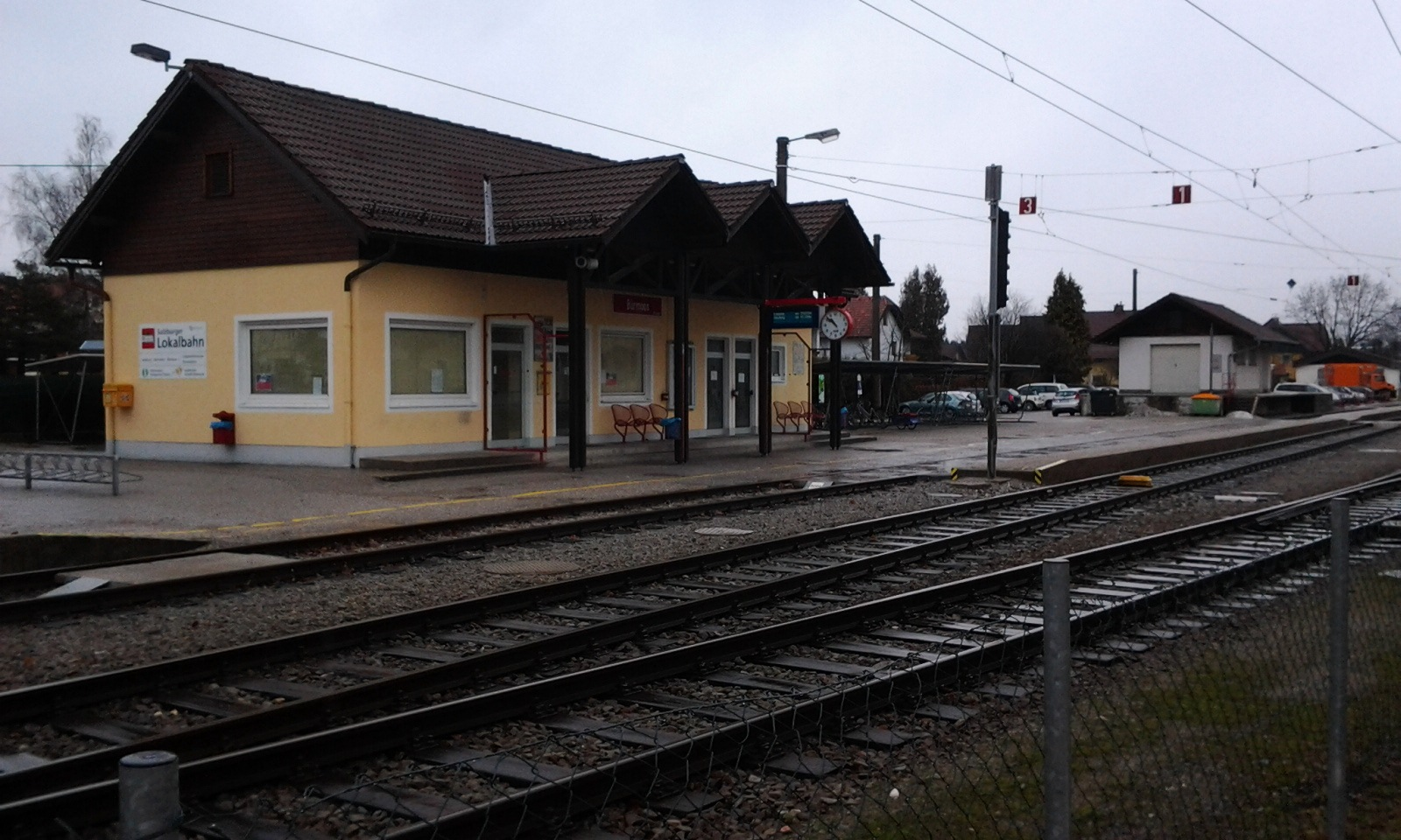 Aufnahmegebäude